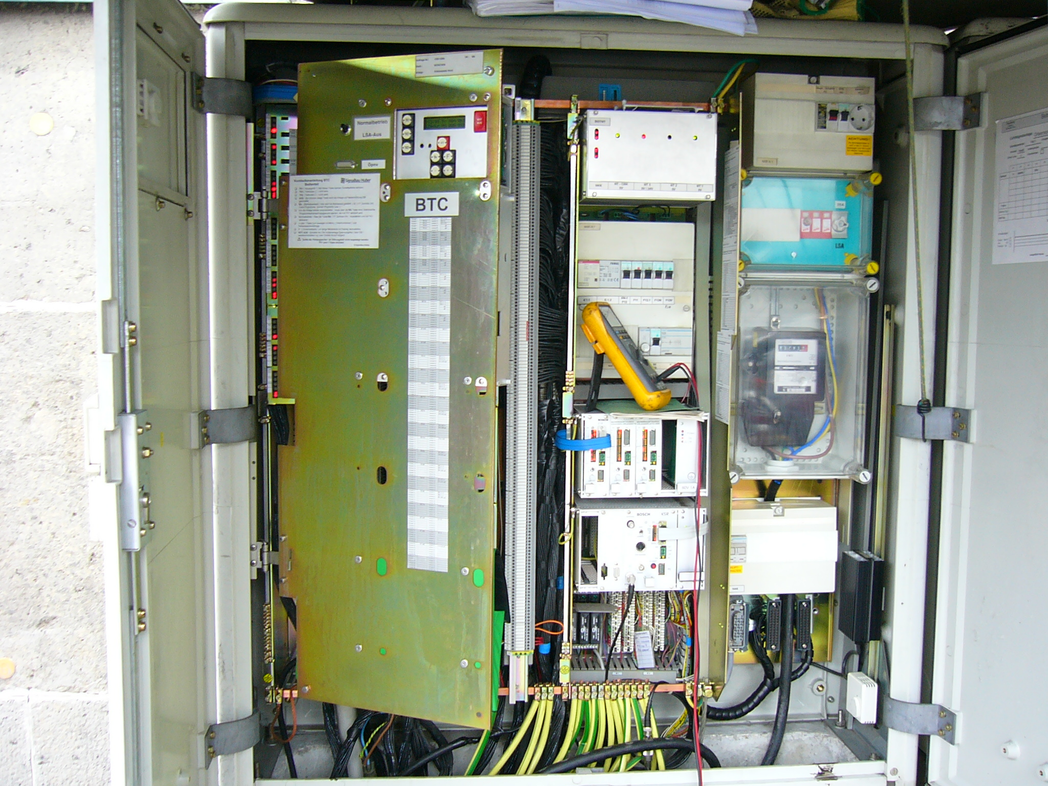 Schaltschrank für Lichtzeichenanlagen, Modell Signalbau Huber BTC 5000.